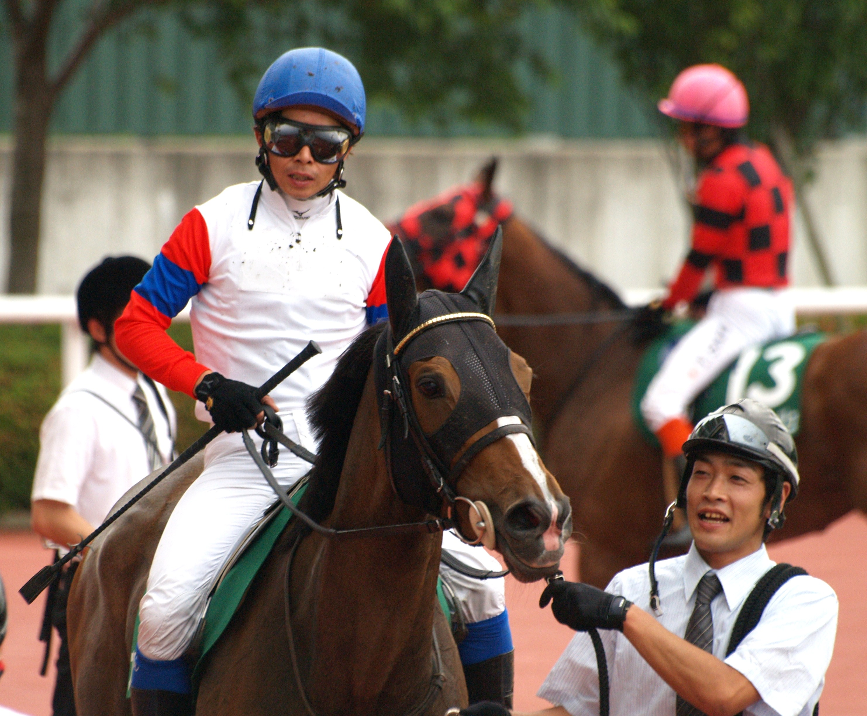 2011年6月19日＠マーメイドSにて。